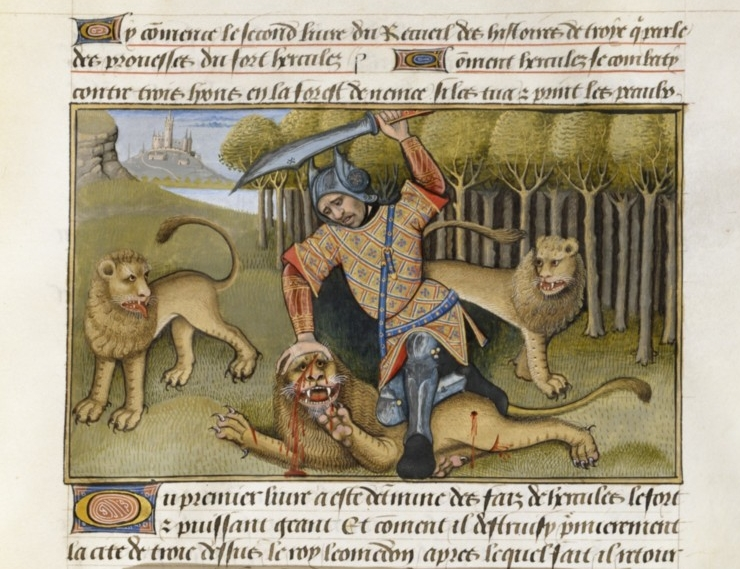 RC-A-86899 légende Hercule terrassant le lion de Némée département Manuscrits occidentaux cote du document FRANCAIS 252 exposition 2005 - Bestiaire médiéval, enluminures période du document XVIème siècle date du document ou du recueil 14..-15.. partie de Recueil des histoires de Troyes. - Cognac folio, pagination Folio 99 auteur(s) Testard, Robinet (Enlumineur) Le Fèvre, Raoul (14..-14..) (